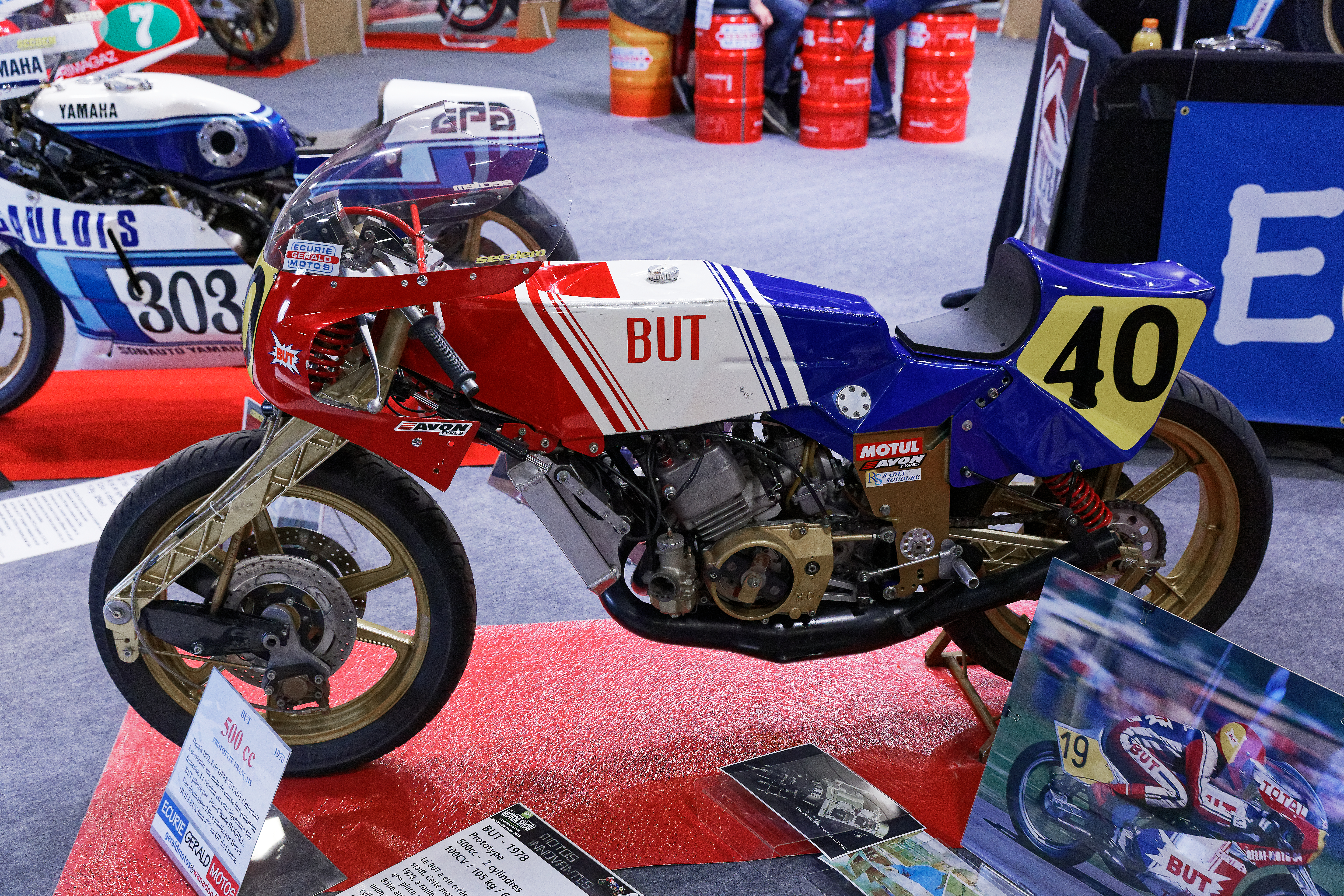 Une BUT 500 cc exposée lors du mondial de l'automobile de Paris 2018.